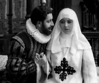 Los actores Fortunio Bonanova e Inocencia Alcubierre en una escena de la película Don Juan Tenorio, de Ricardo de Baños